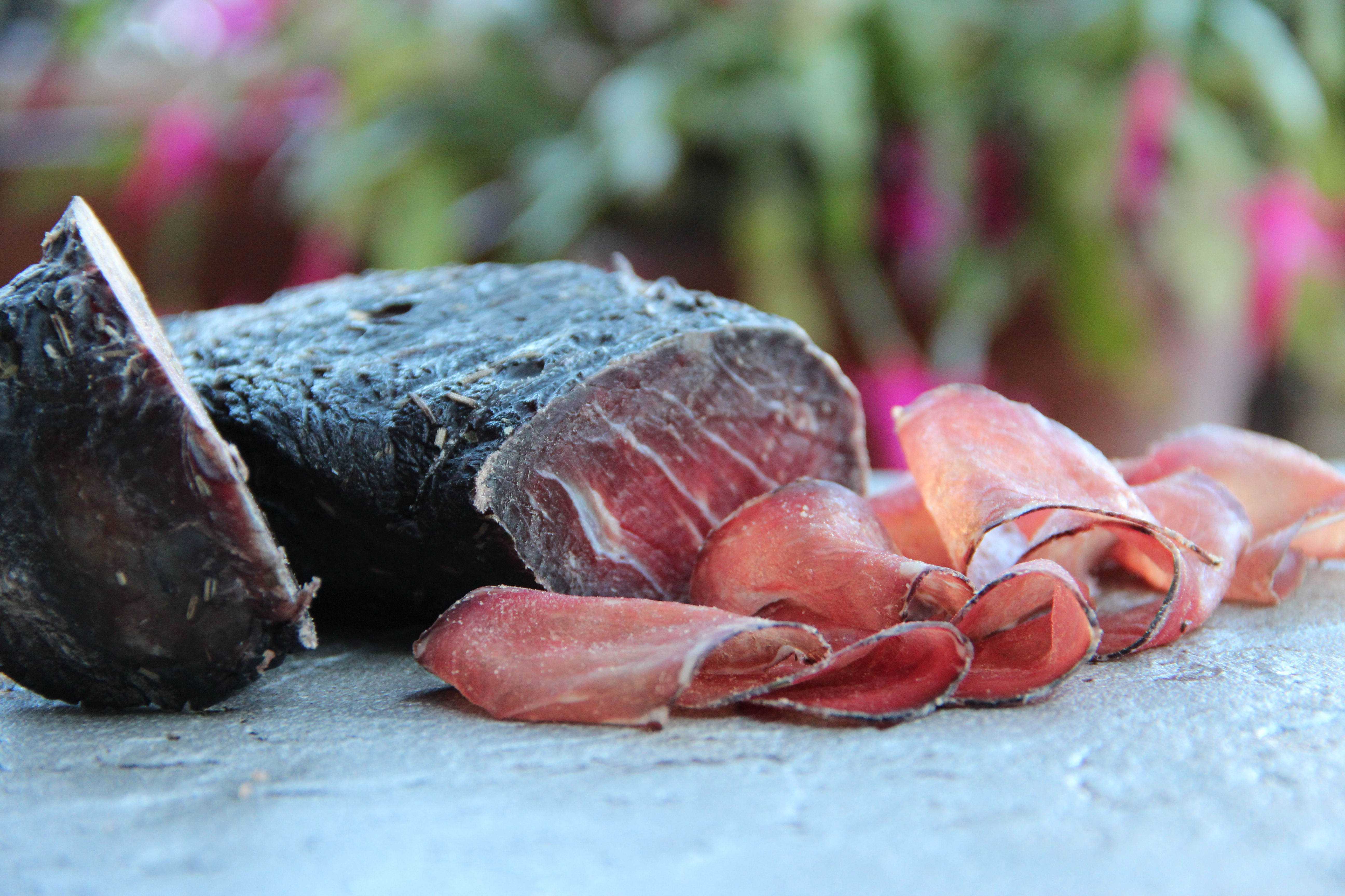 Trockenfleisch